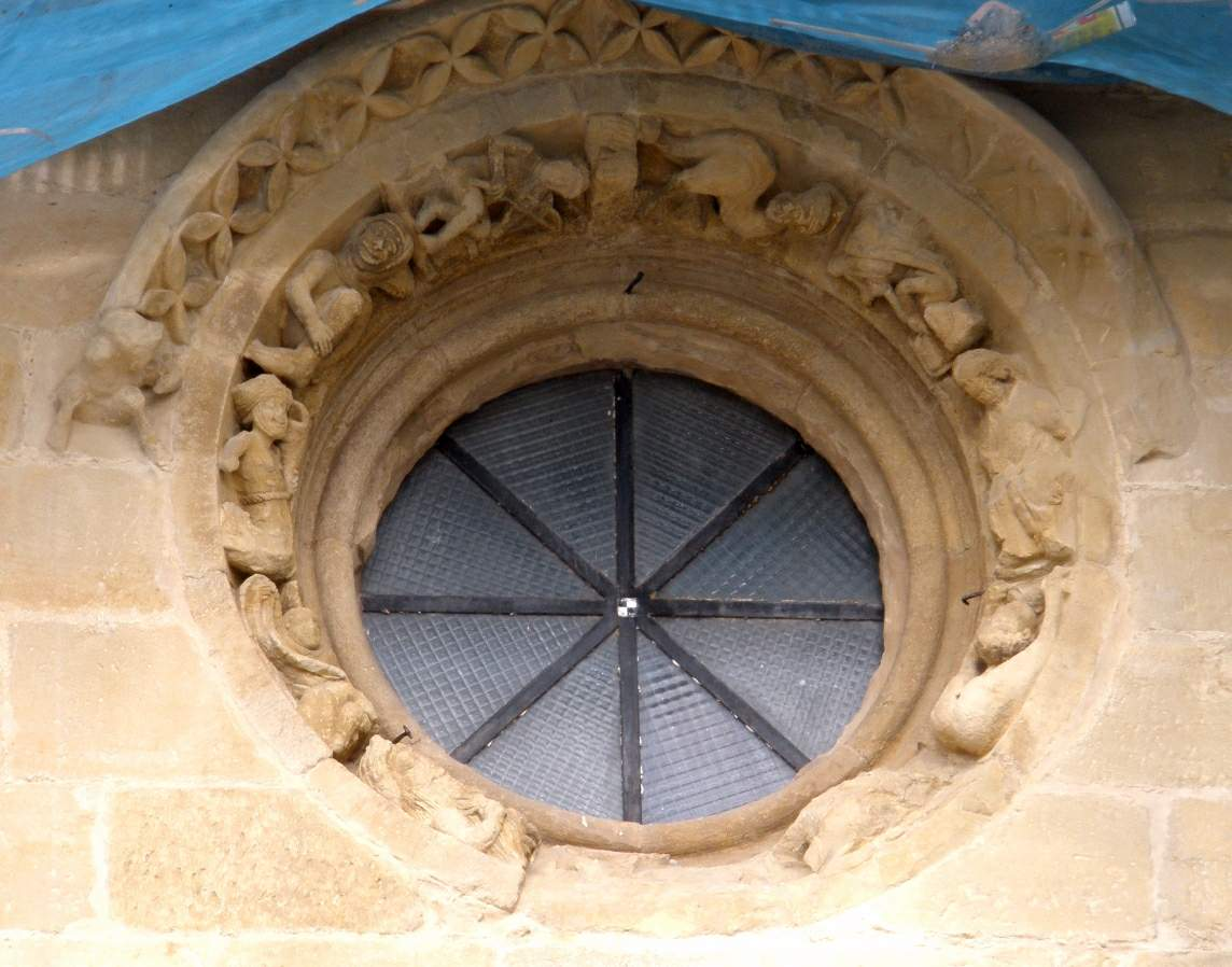 Óculo historiado sobre la Portada de los Abuelos de la Iglesia de San Juan de Laguardia (Álava)